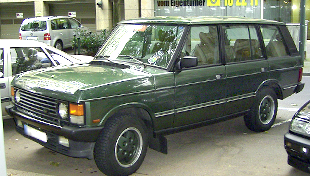 Range Rover late-type.